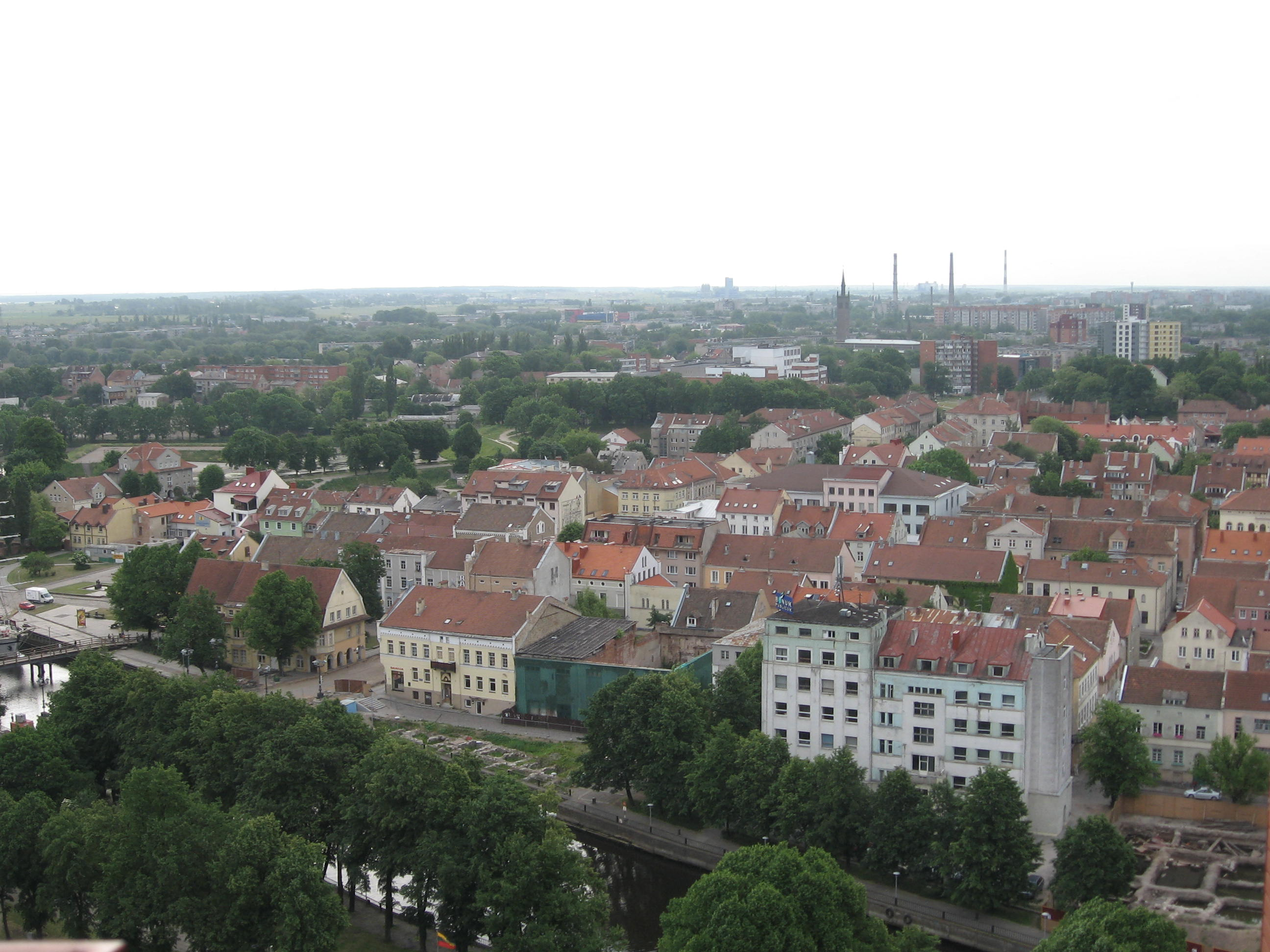 Klaipėdos senamiestis